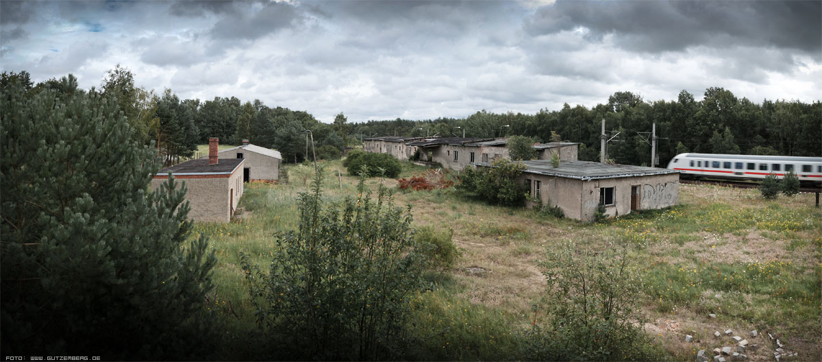 Die DDR-Wagengrenzstelle Kuhlenfeld im Jahr 2011